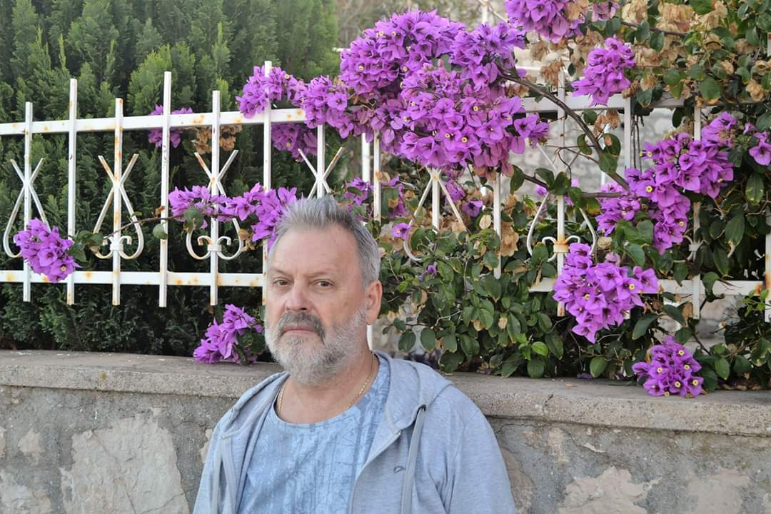 Костянтин Могилевський